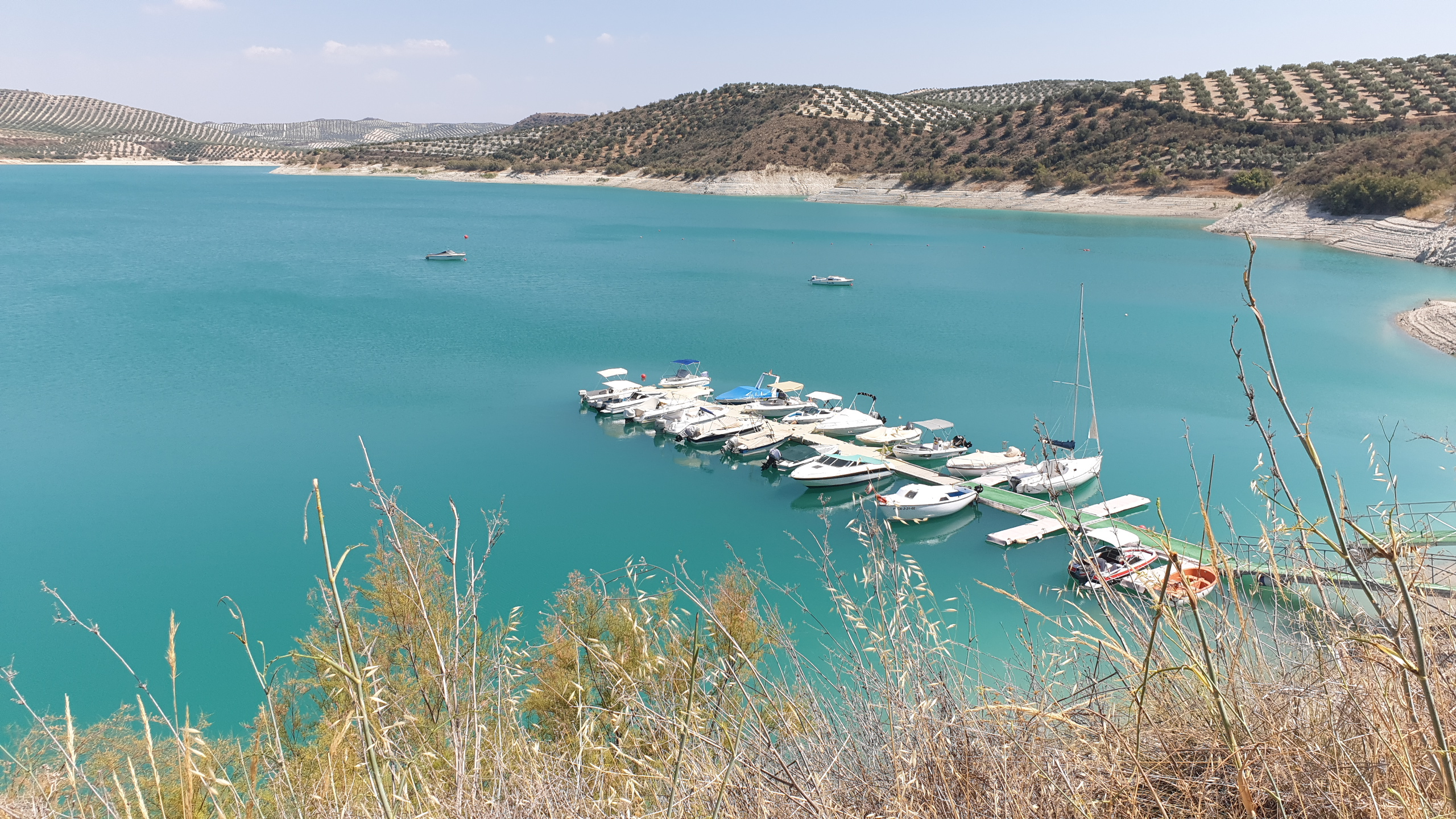 Embalse y presa de Vadomojón